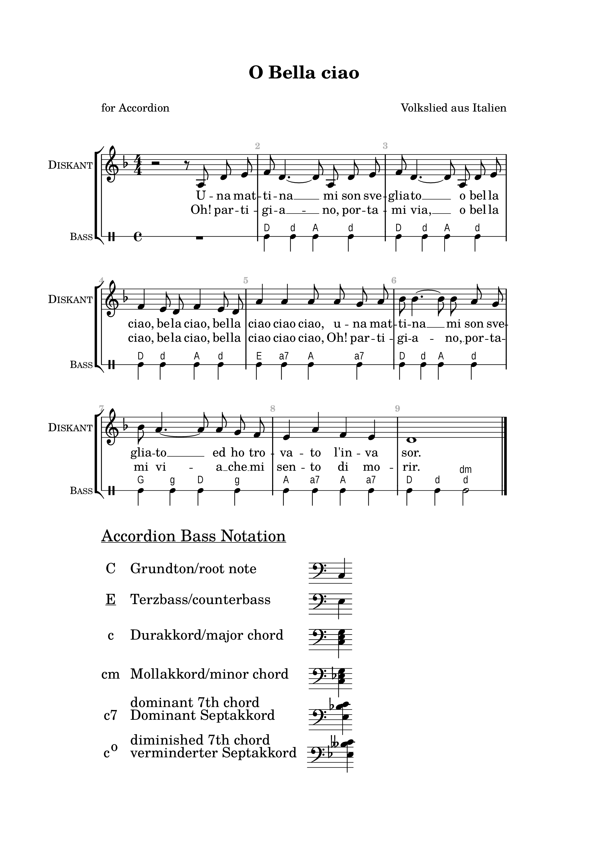 Volkslied aus Italien, für Akkordeon gesetzt